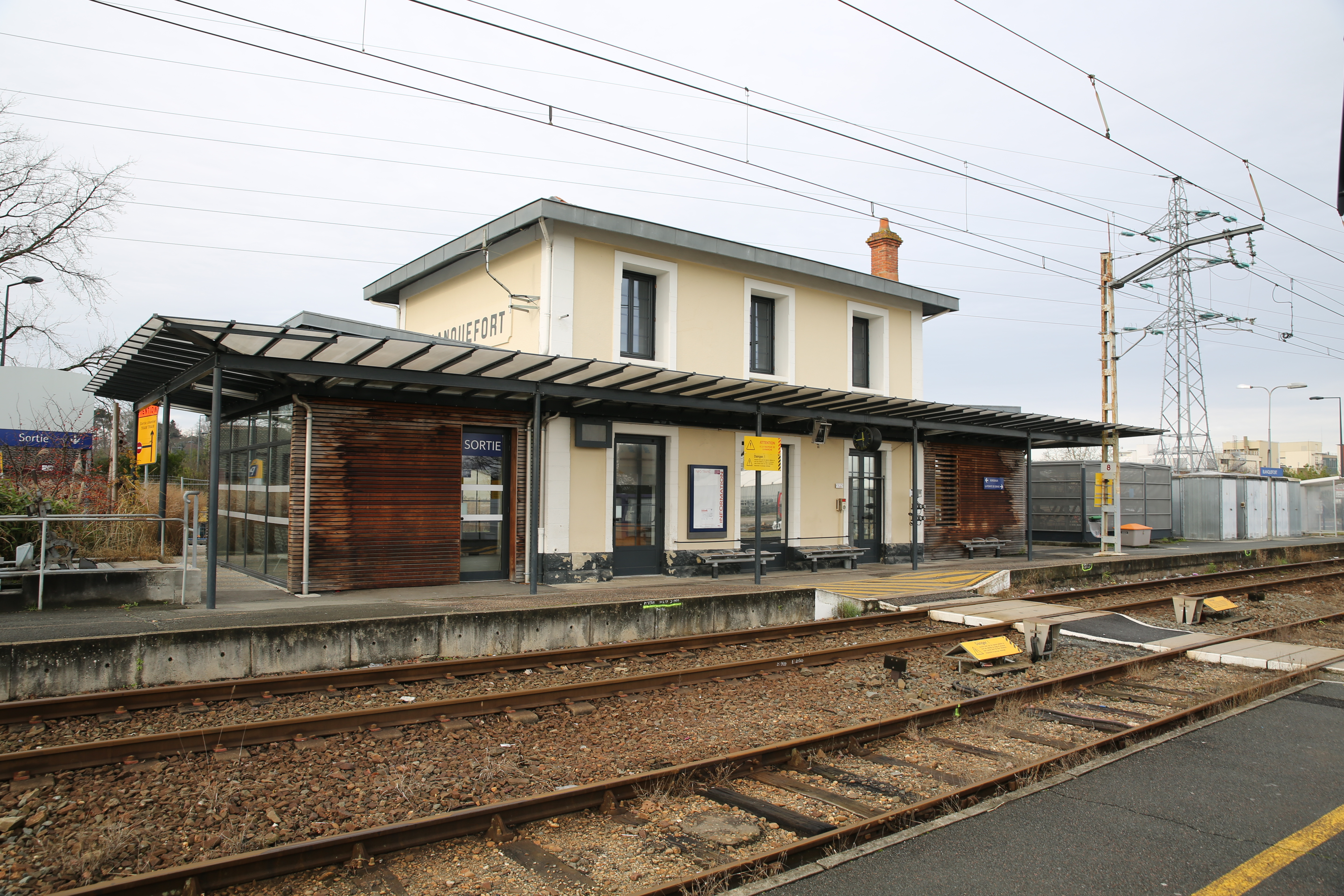 Gare de Blanquefort